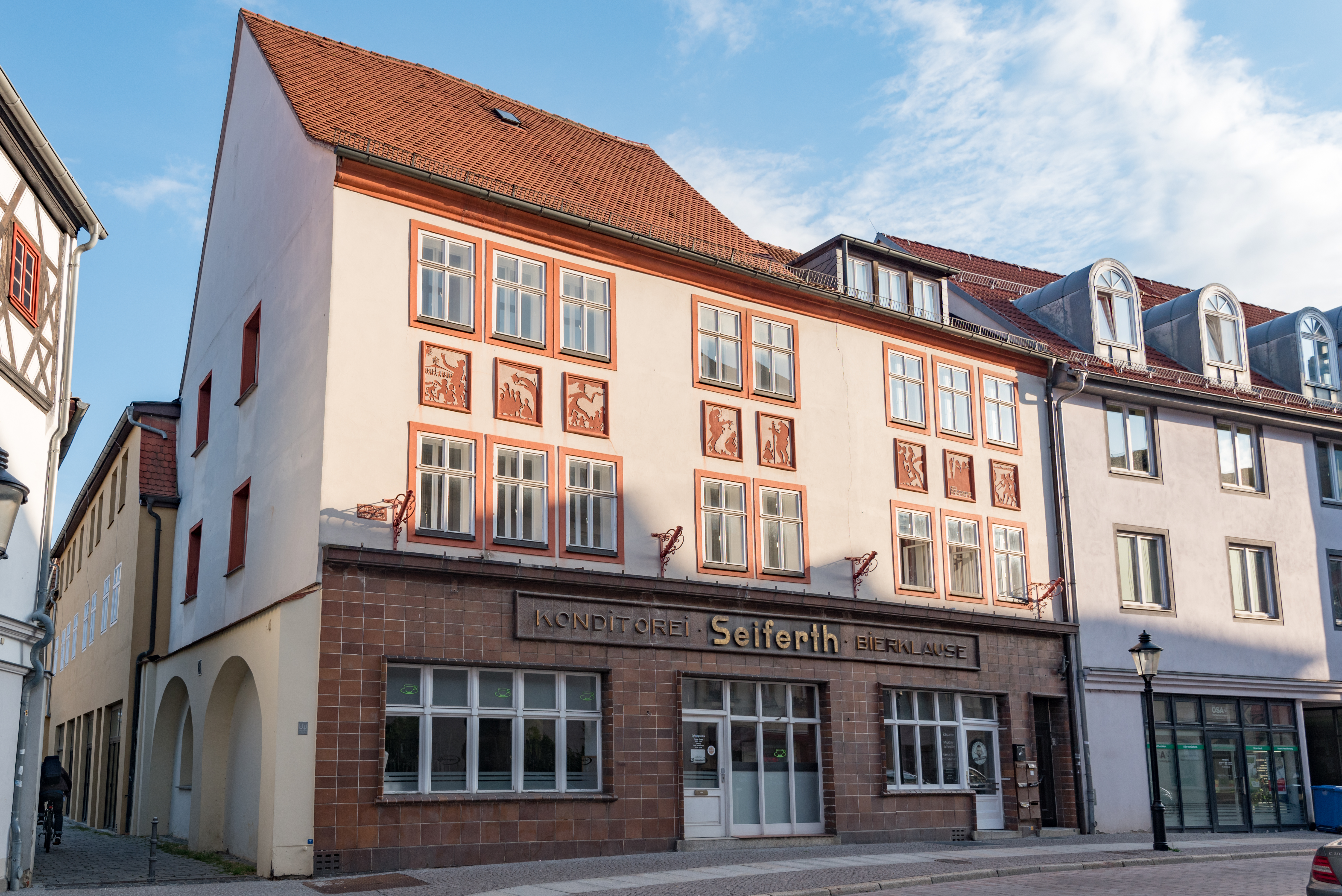 Naumburg (Saale), Marienstraße 5, 6